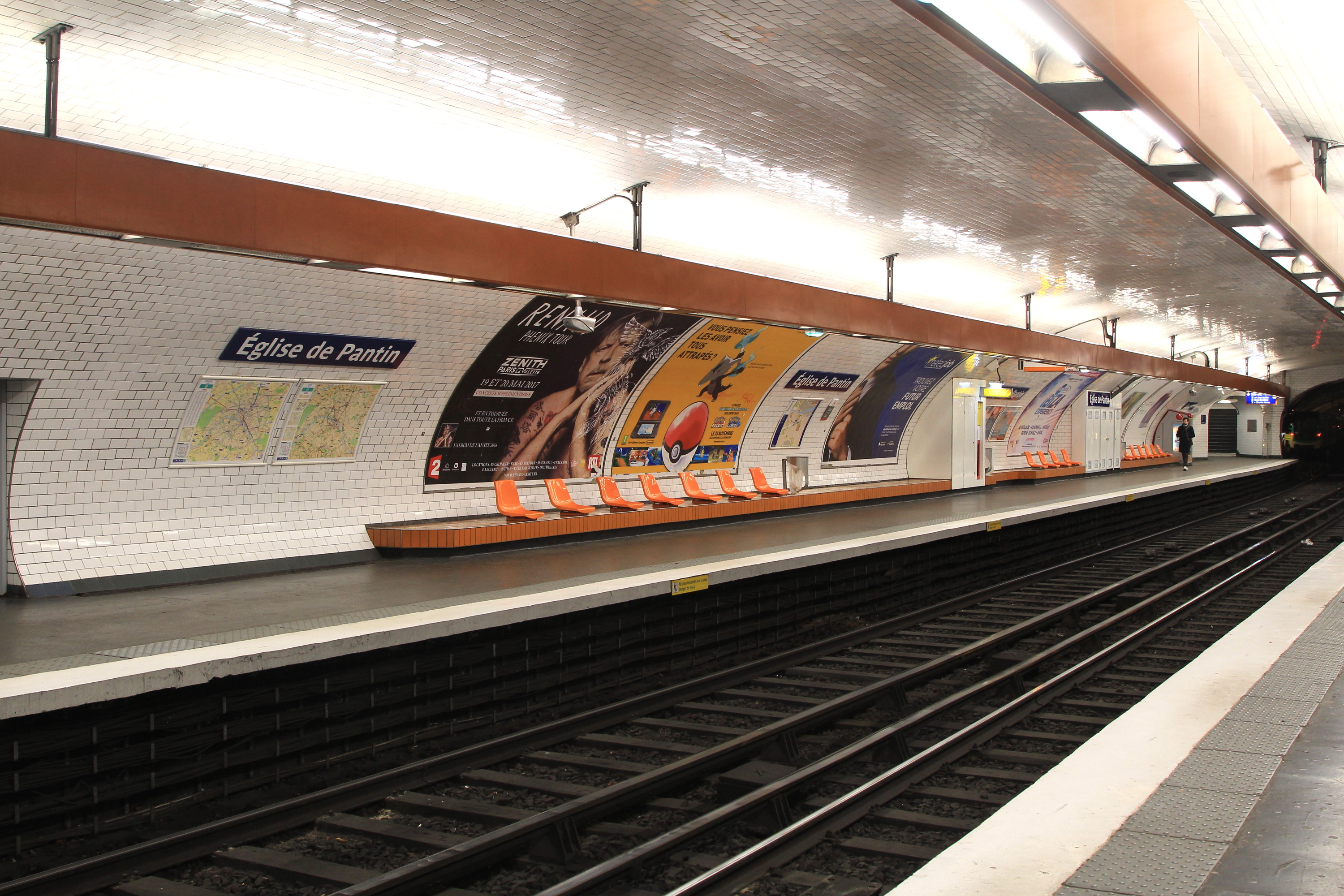 Quai en direction de Place d'Italie de la station Église de Pantin de la ligne 5 du métro de Paris.